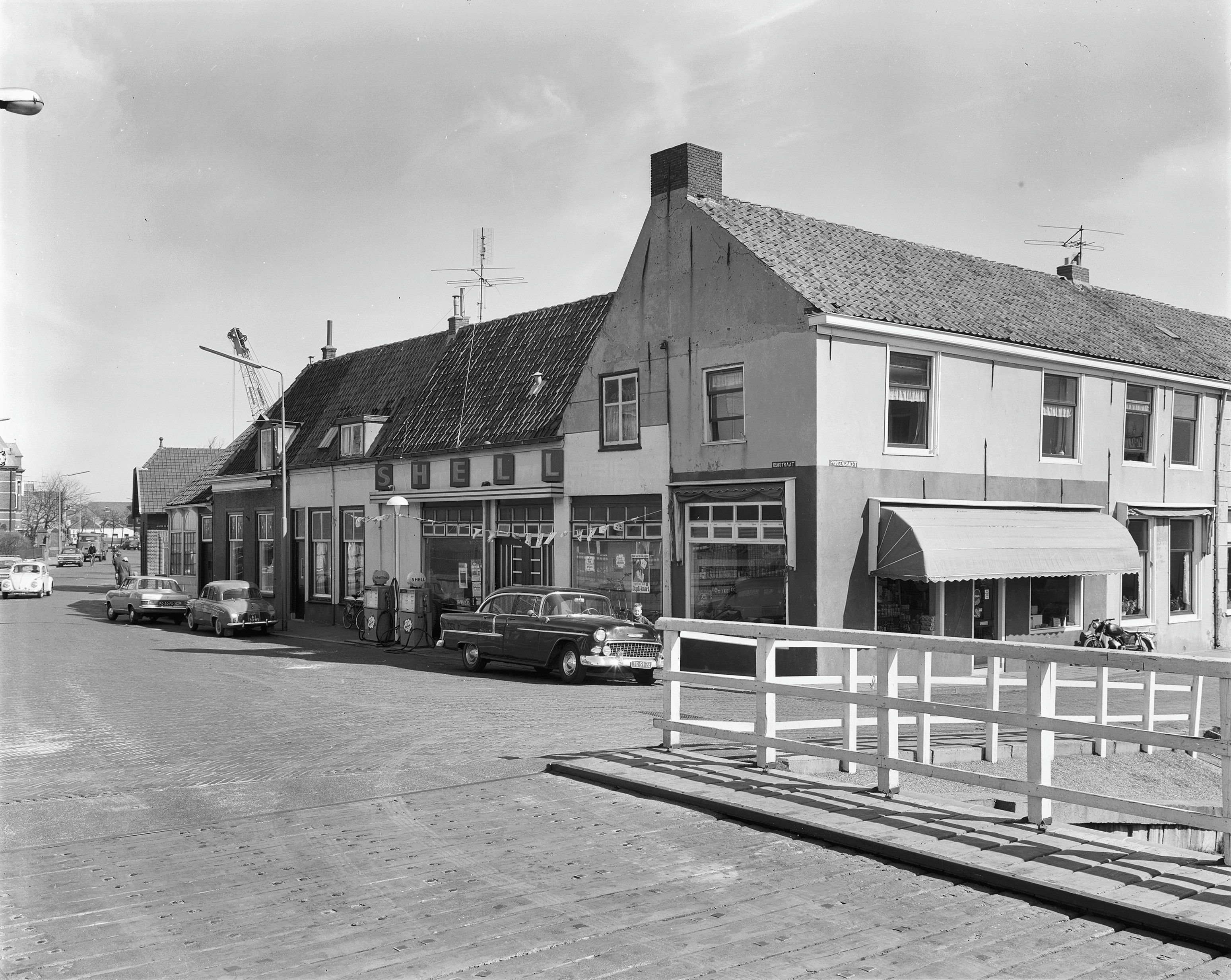 aanzicht